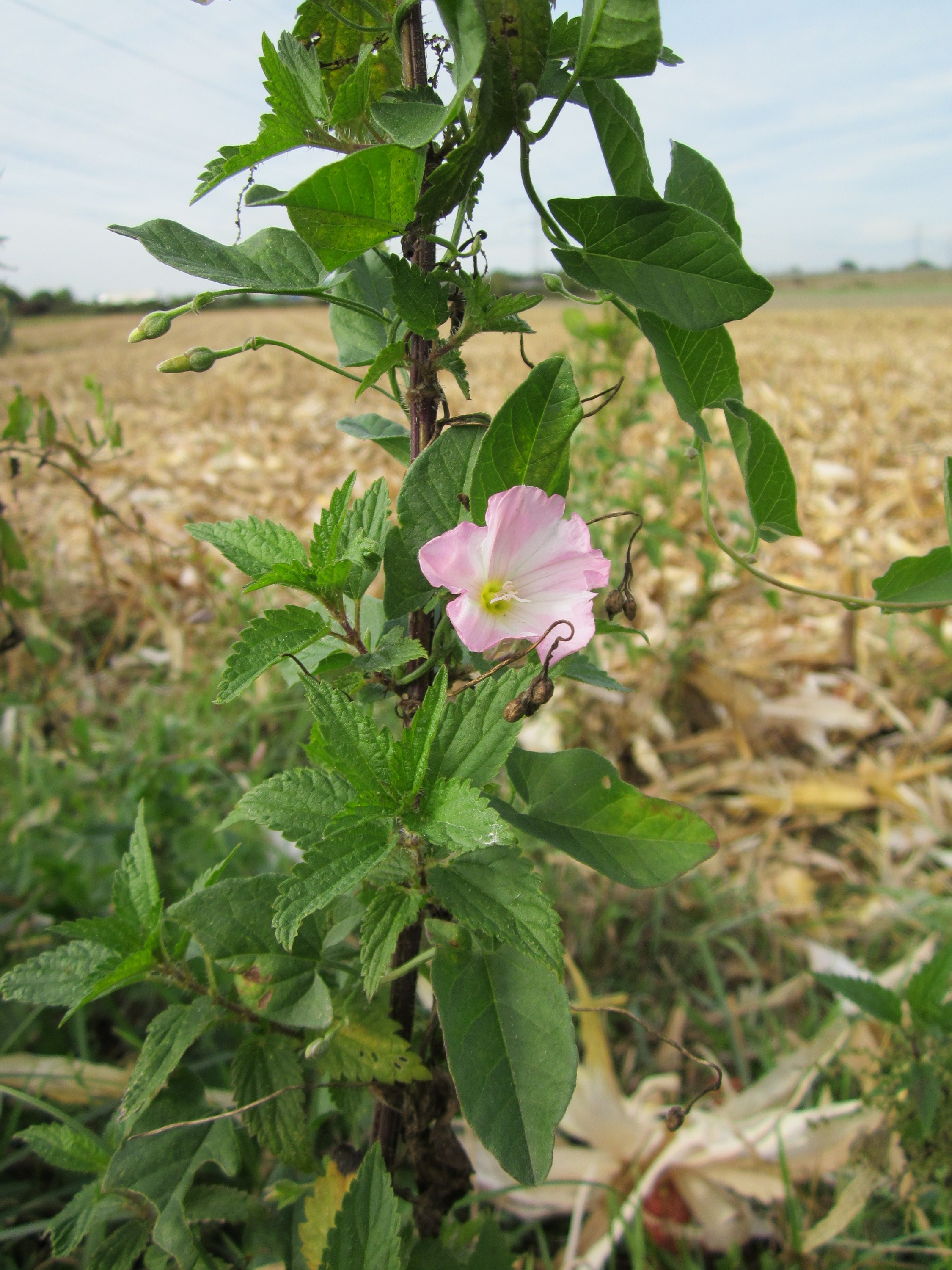 Ackerwinde (Convolvulus arvensis) im Hockenheimer Rheinbogen